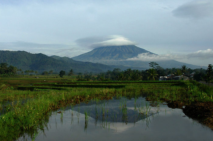 gunung sumbing, magelang, jawa tengah, indonesia